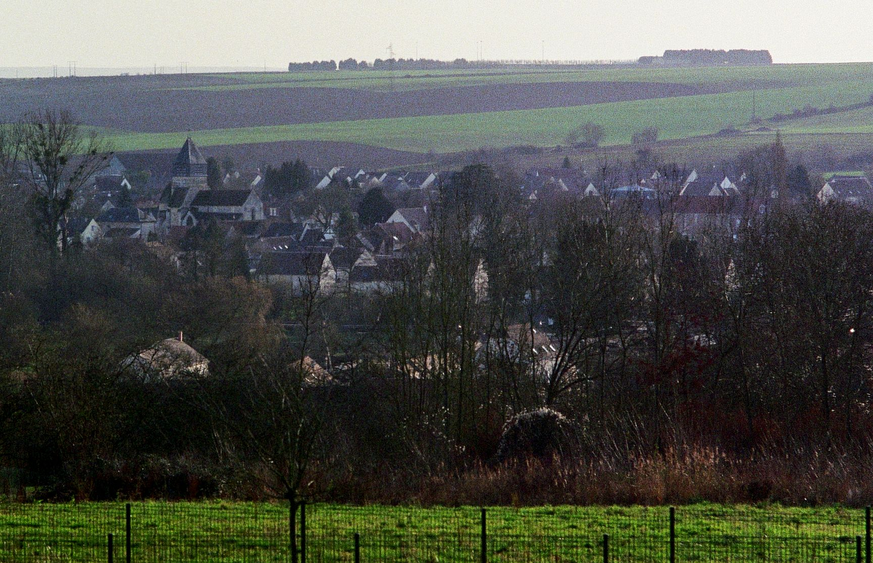 Coudun vu de la colline de Giraumont - Février 2016